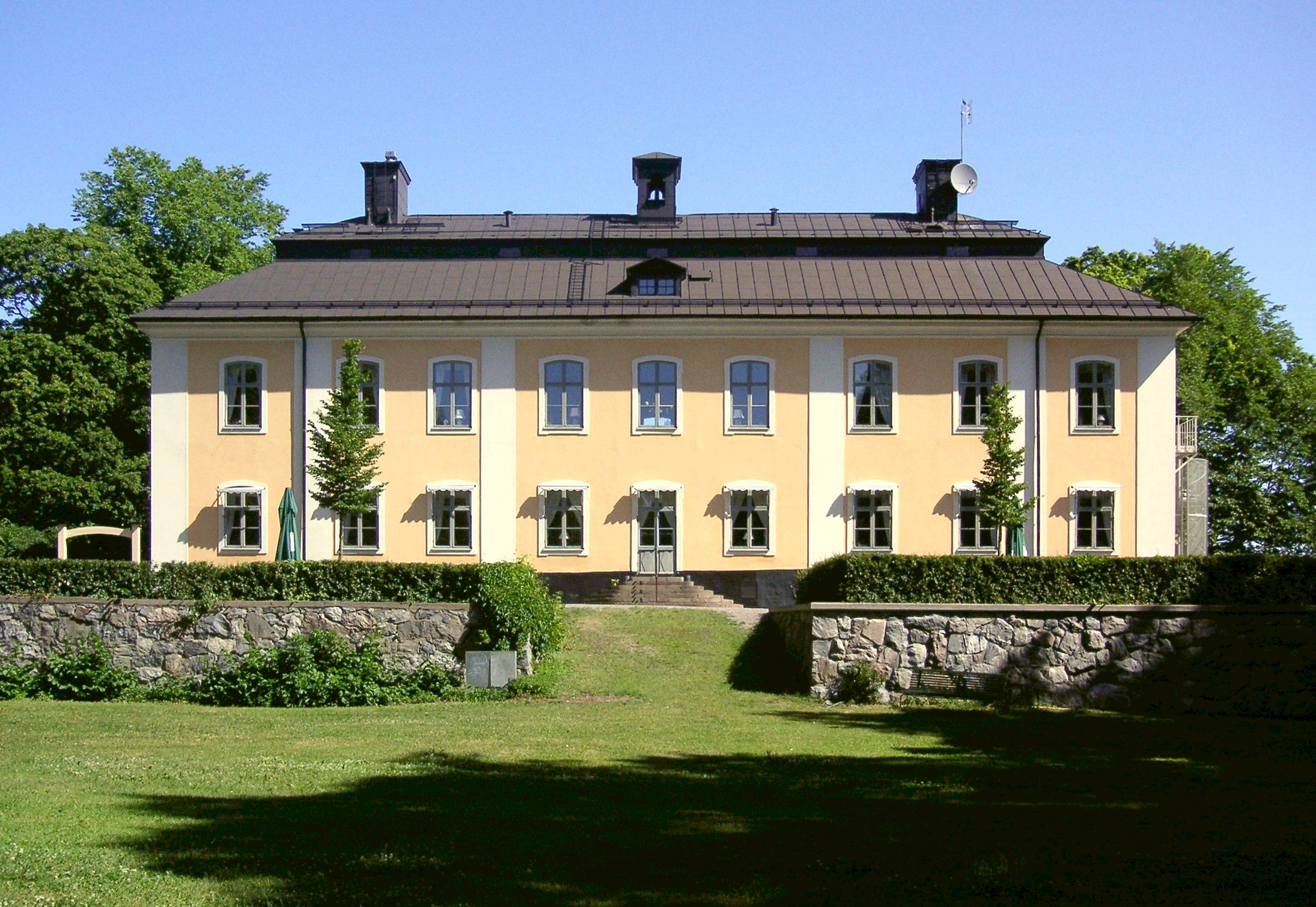 Åkeshovs slott i Bromma, Stockholm